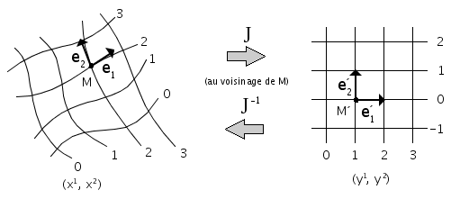 Coordonées curvilignes